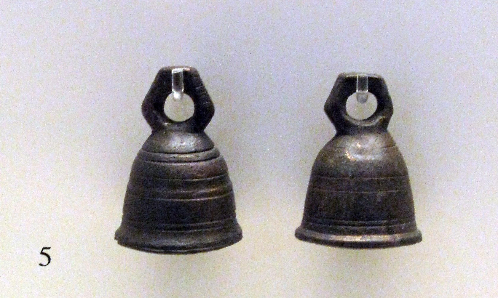 National Archaeological Museum. Athens, Greece. --- Χάλκινα καμπανάκια για ιερές και μαγικές τελετές - αποτροπαϊκά σύμβολα προστασίας. Ρωμαϊκή περίοδος. Αιγυπτιακή συλλογή. Εθνικό Αρχαιολογικό Μουσείο. Αθήνα.